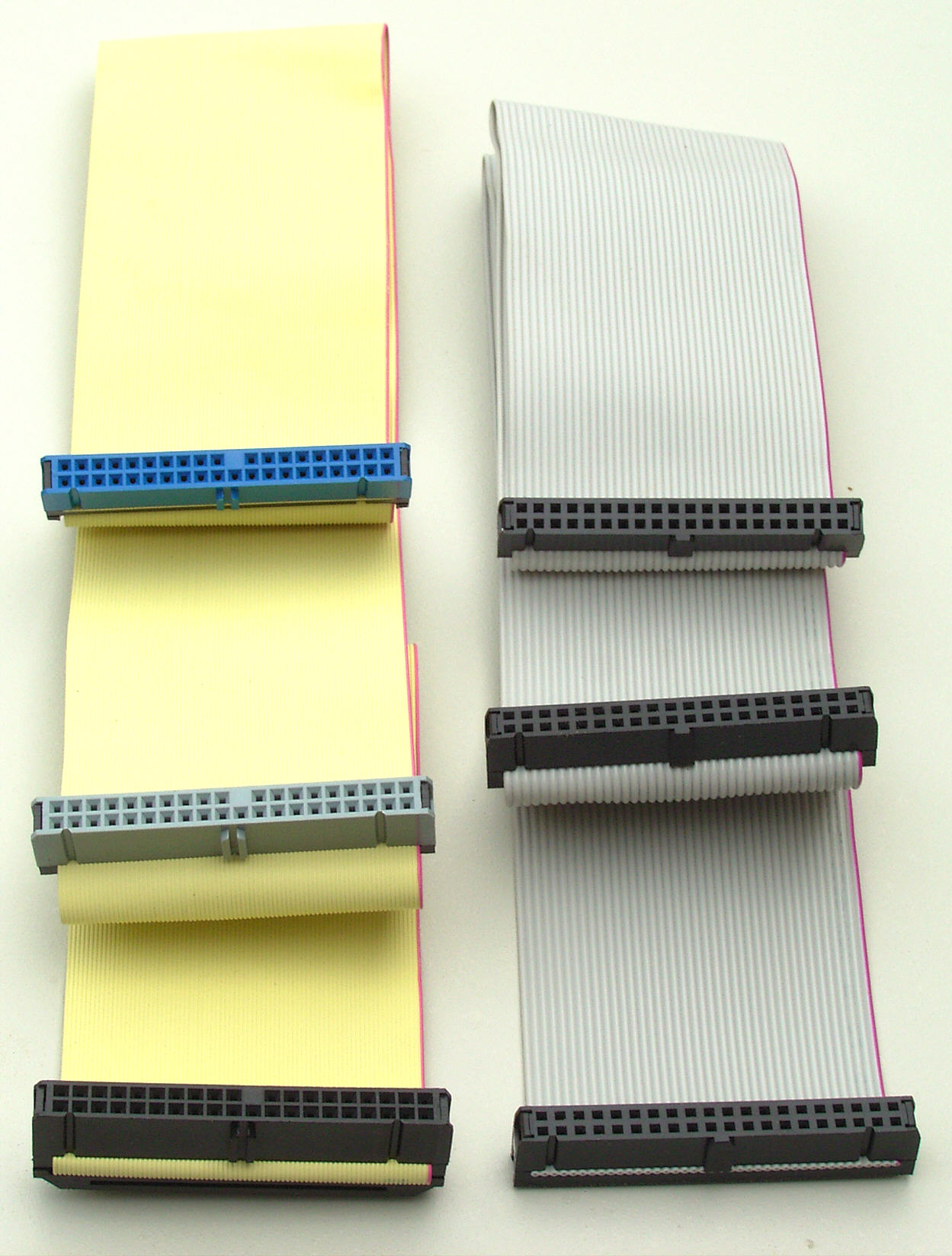 Zwei IDE-Kabel. Links ein 80-poliges UDMA-Kabel mit farbliche gekennzeichneten und codierten Buchsenleisten. Blau: Mainboard bzw. Host, grau: Slave, schwarz: Master. Rechts ein 40-poliges Standardkabel, bis maximal UDMA33 spezifiziert.